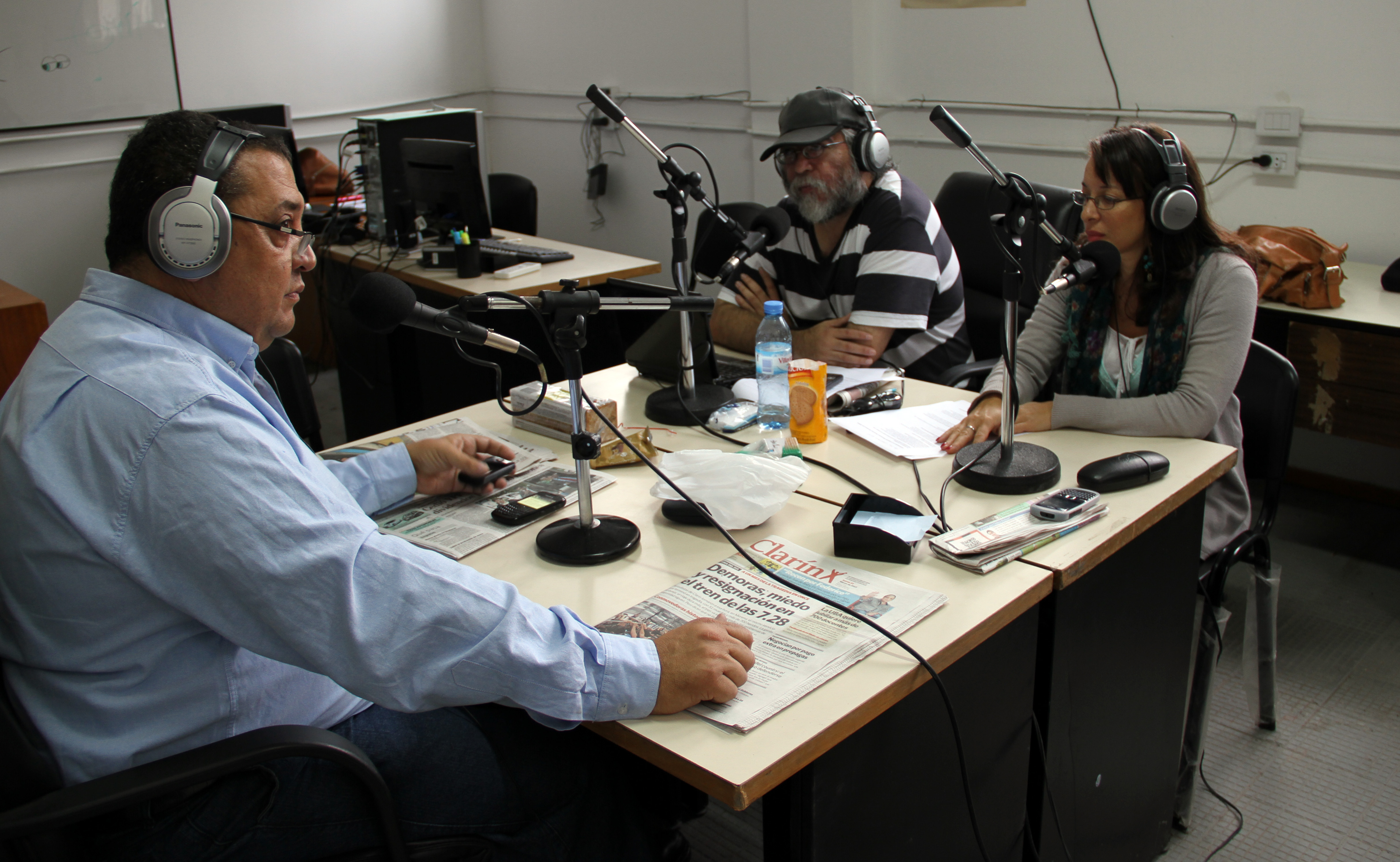 Luis D'Elía, realizando su programa de radio desde la Casa de la Militancia.